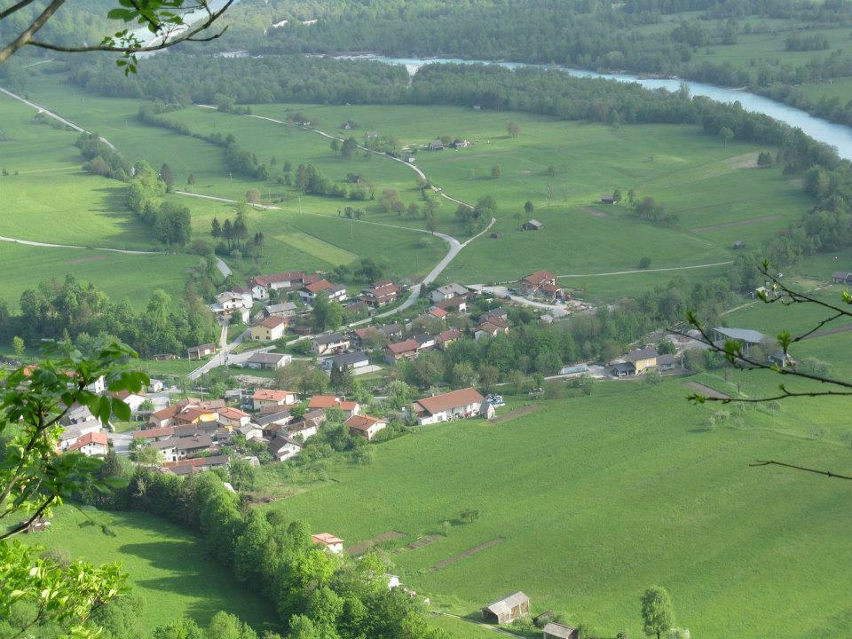 Ladra z Ladrskega vrha.